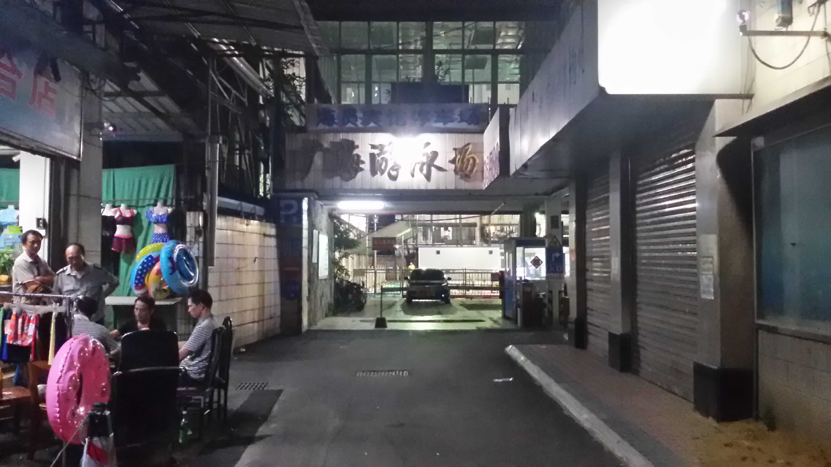 粵語: 廣海遊泳場嘅正門